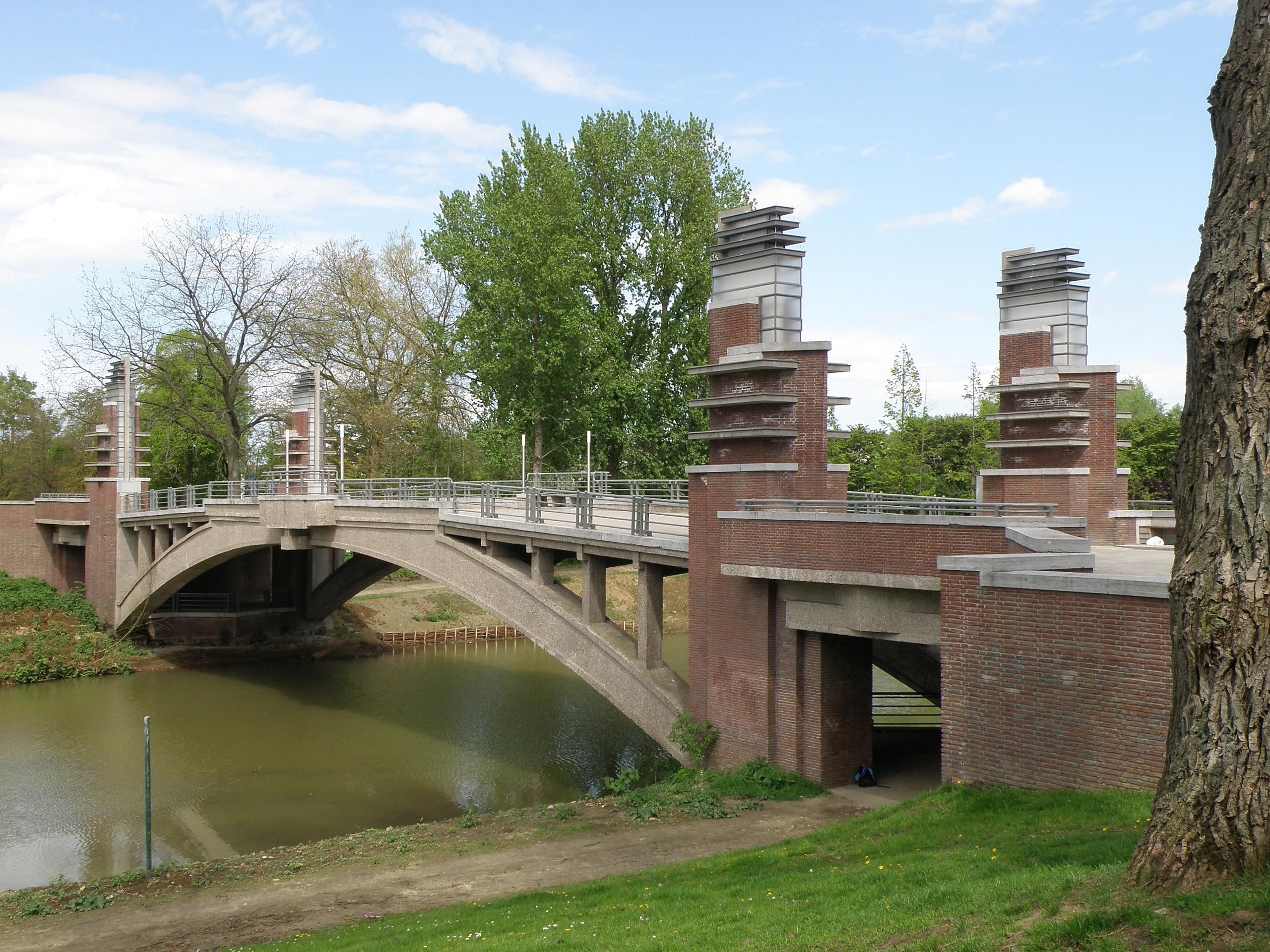 Antwerpen, district Antwerpen. Een van de twee identieke bruggen, n.a.v. de wereldtentoonstelling van 1930 gebouwd over een vijver (restant van een ravelijngracht van de Brialmontvesting), n.o.v. architect Emiel Van Averbeke.